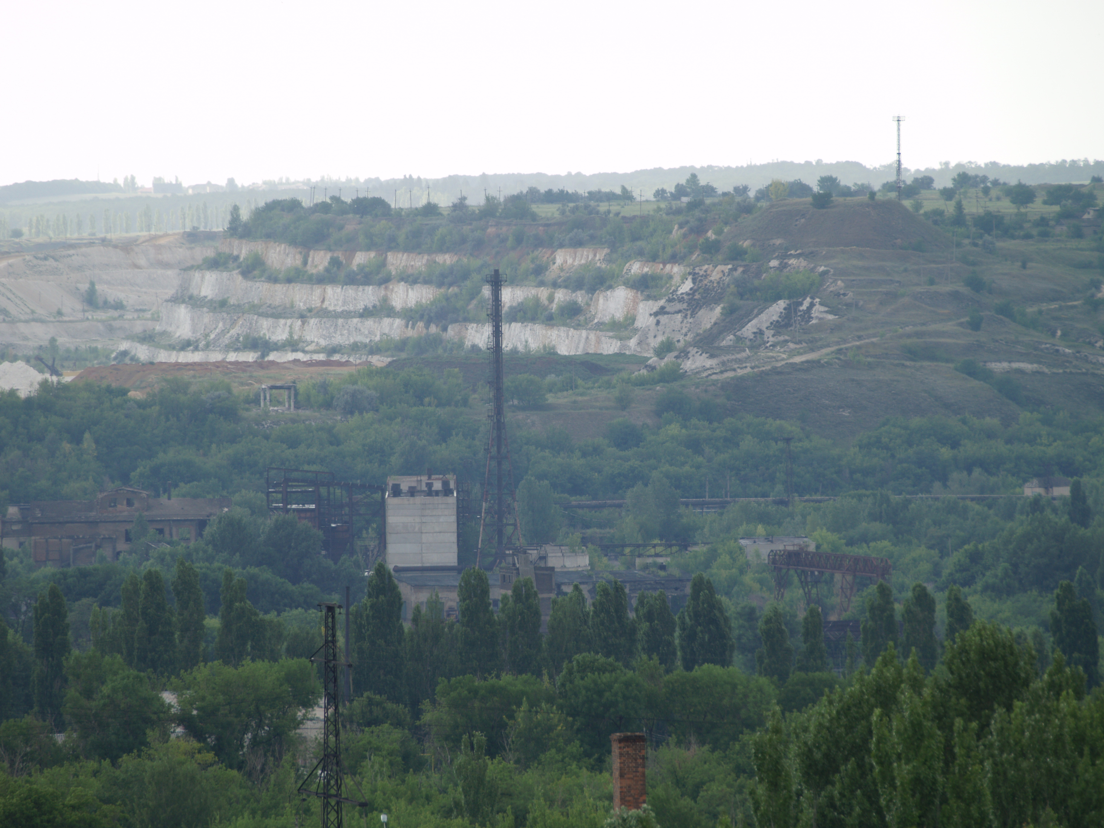 Краматорський металургійний завод і Крейдяна гора: Краматорський металургійний завод і Крейдяна гора